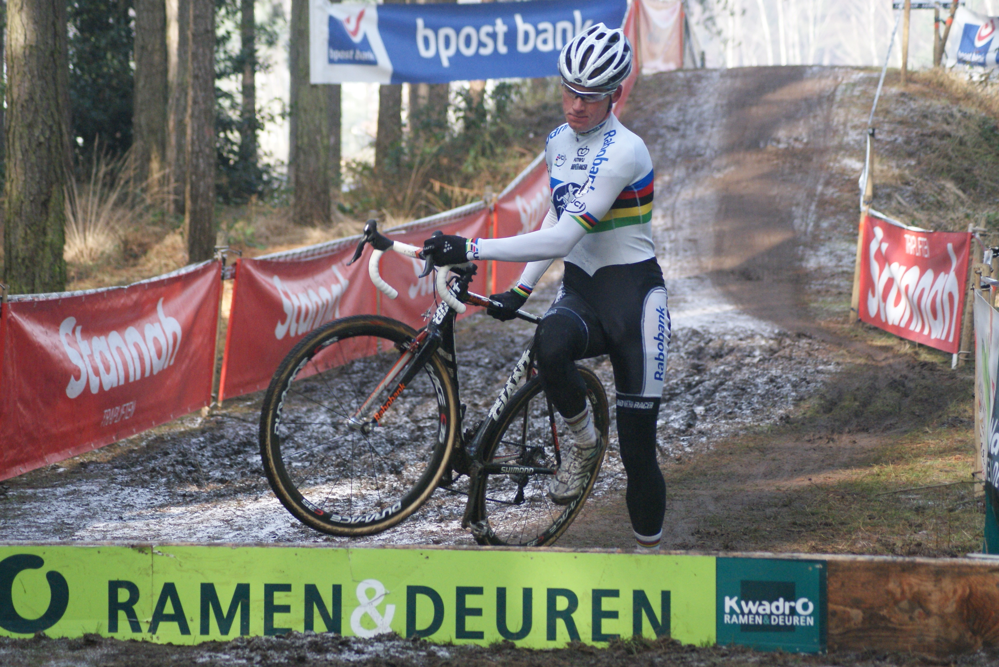 Mike Teunissen neemt de balkjes tijdens de Krawatencross in Lille in 2013